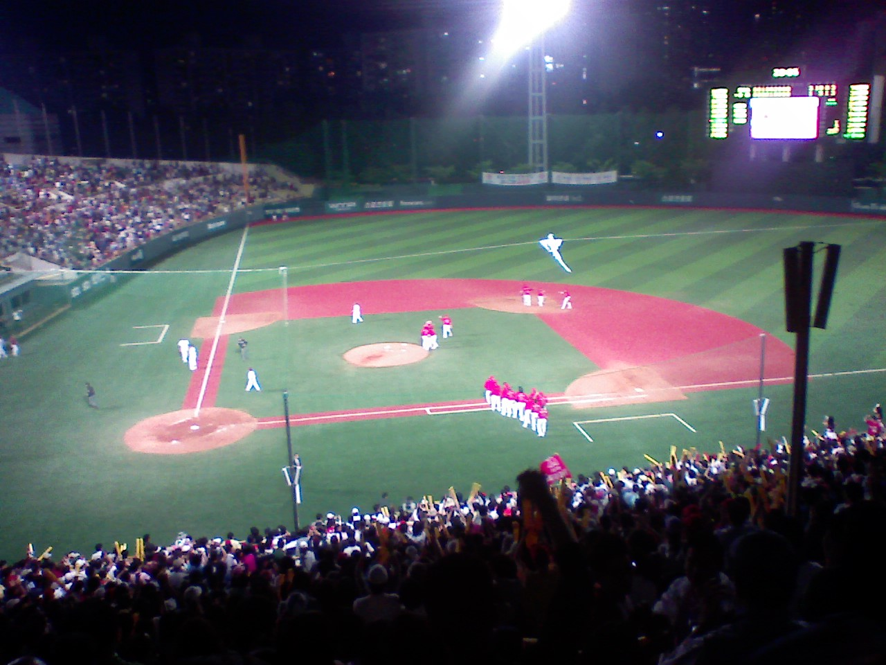 제가 핸드폰으로 직접 찍었습니다.